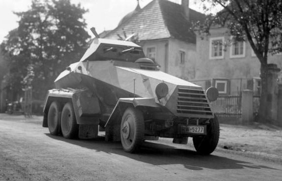 Herbstmanöver des IX. Armeekorps in der Bayrischen Ostmark 1935,Panzer-Spähwagen Information added by Wikimedia users.schwerer Panzerspähwagen (Pz.Spw. (6 Rad) (Sd.Kfz. 231)